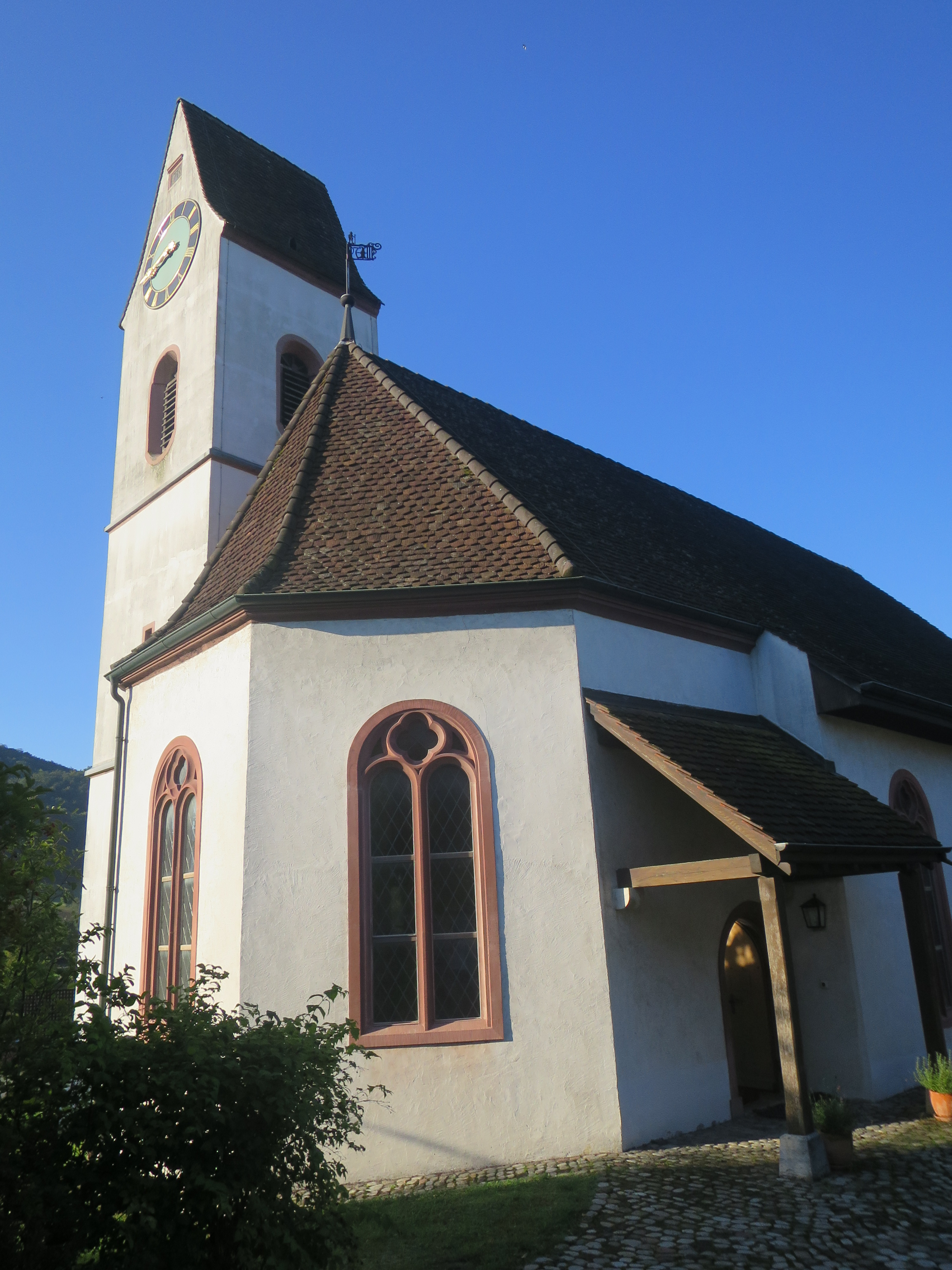 Reformierte Kirche Maisprach, Schweiz